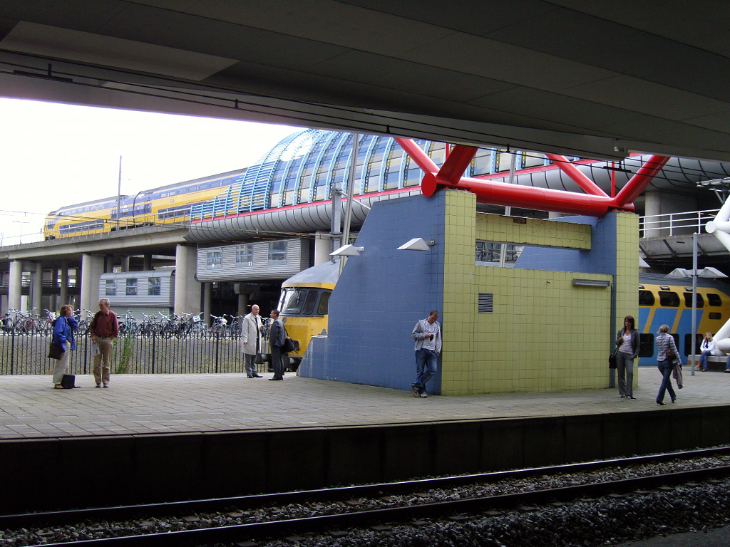 V-IRM en DD-AR Dubbeldeks regiomaterieel op Station Amsterdam Sloterdijk.